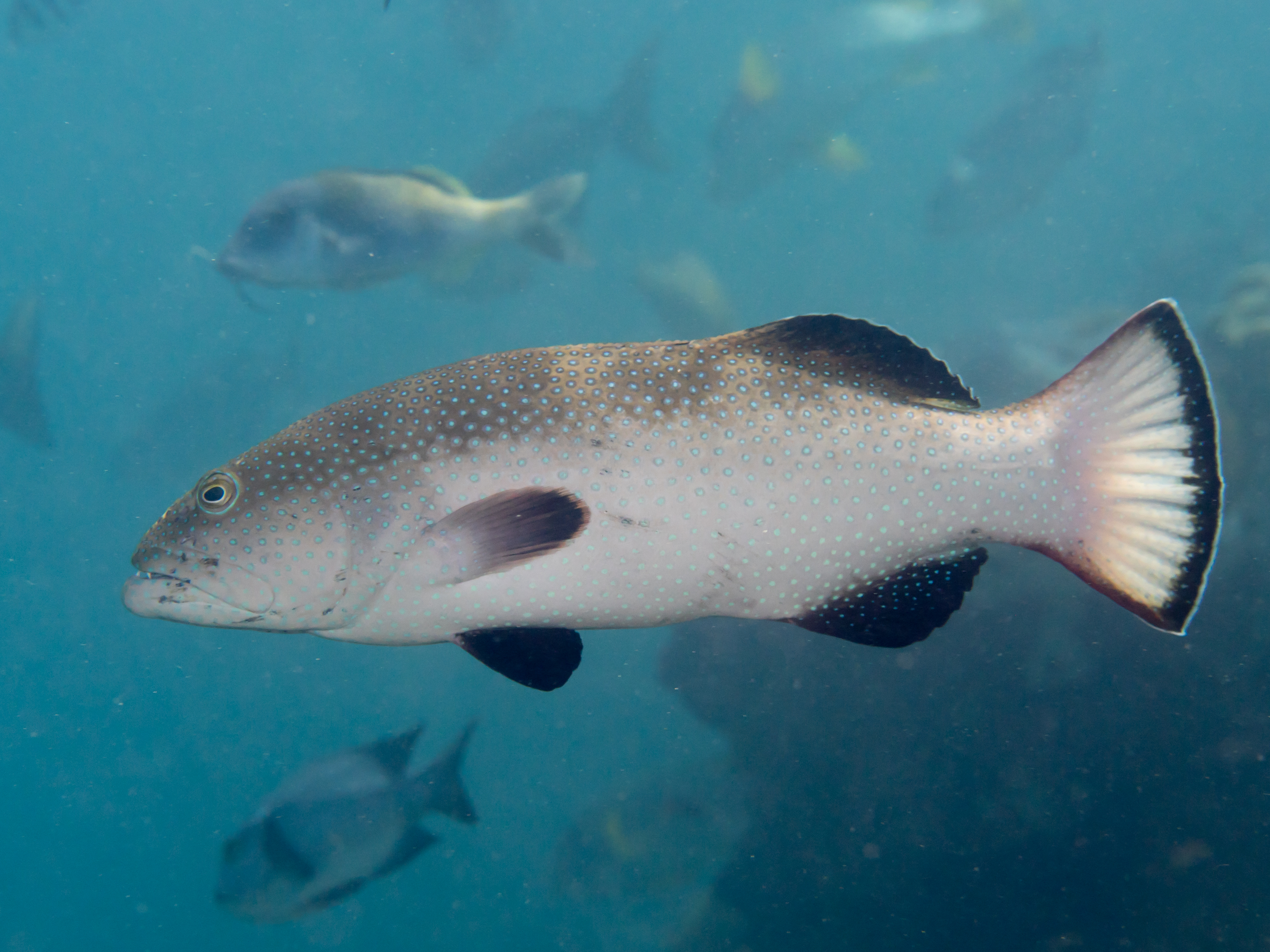 Raja Ampat, Indonesia - Squaretail coral grouper (Plectropomus areolatus)